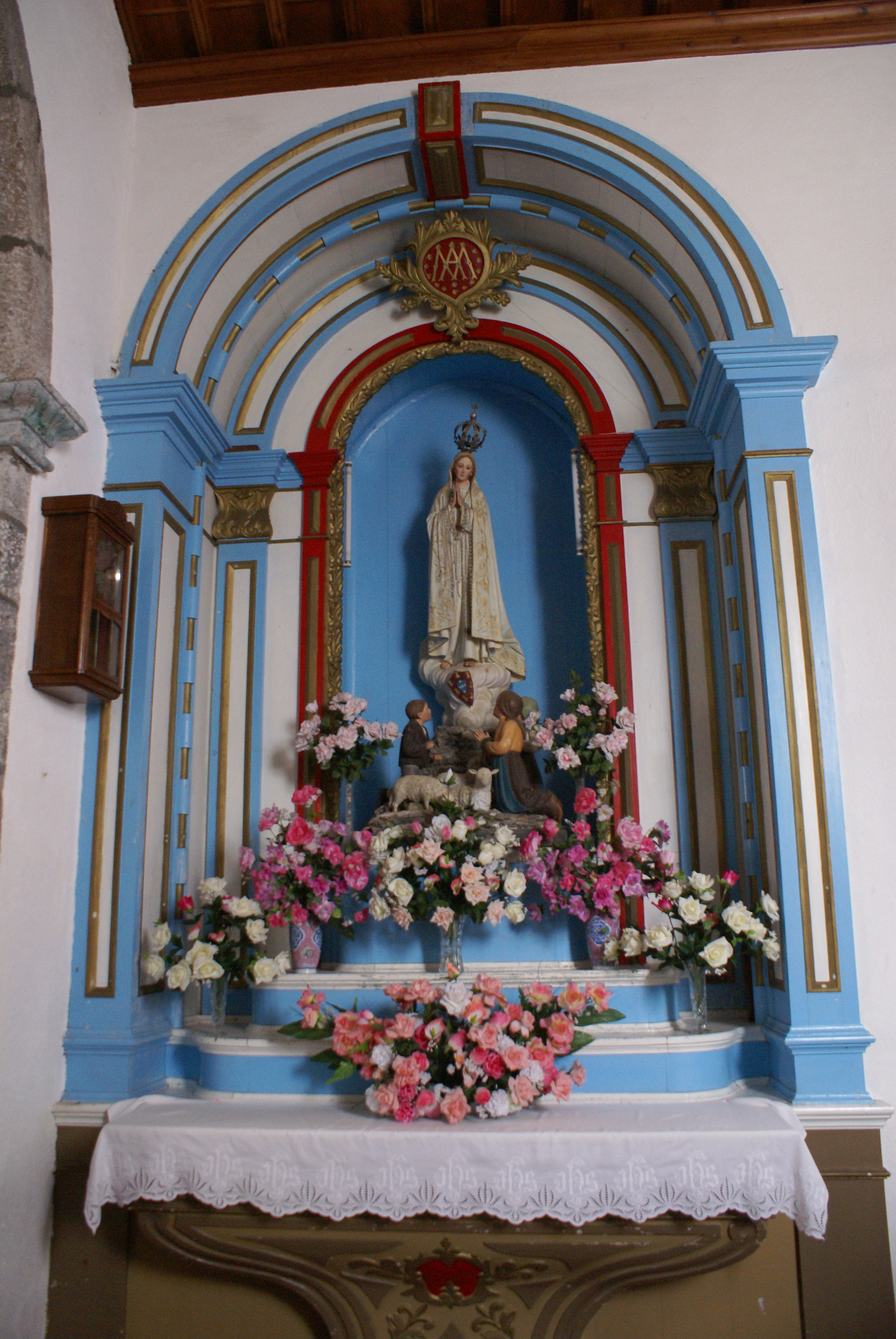 Lateral alter in the Church of Santo Cristo, Fajã da Caldeira de Santo Cristo, Ribeira Seca, Calheta, São Jorge (Azores), Portugal